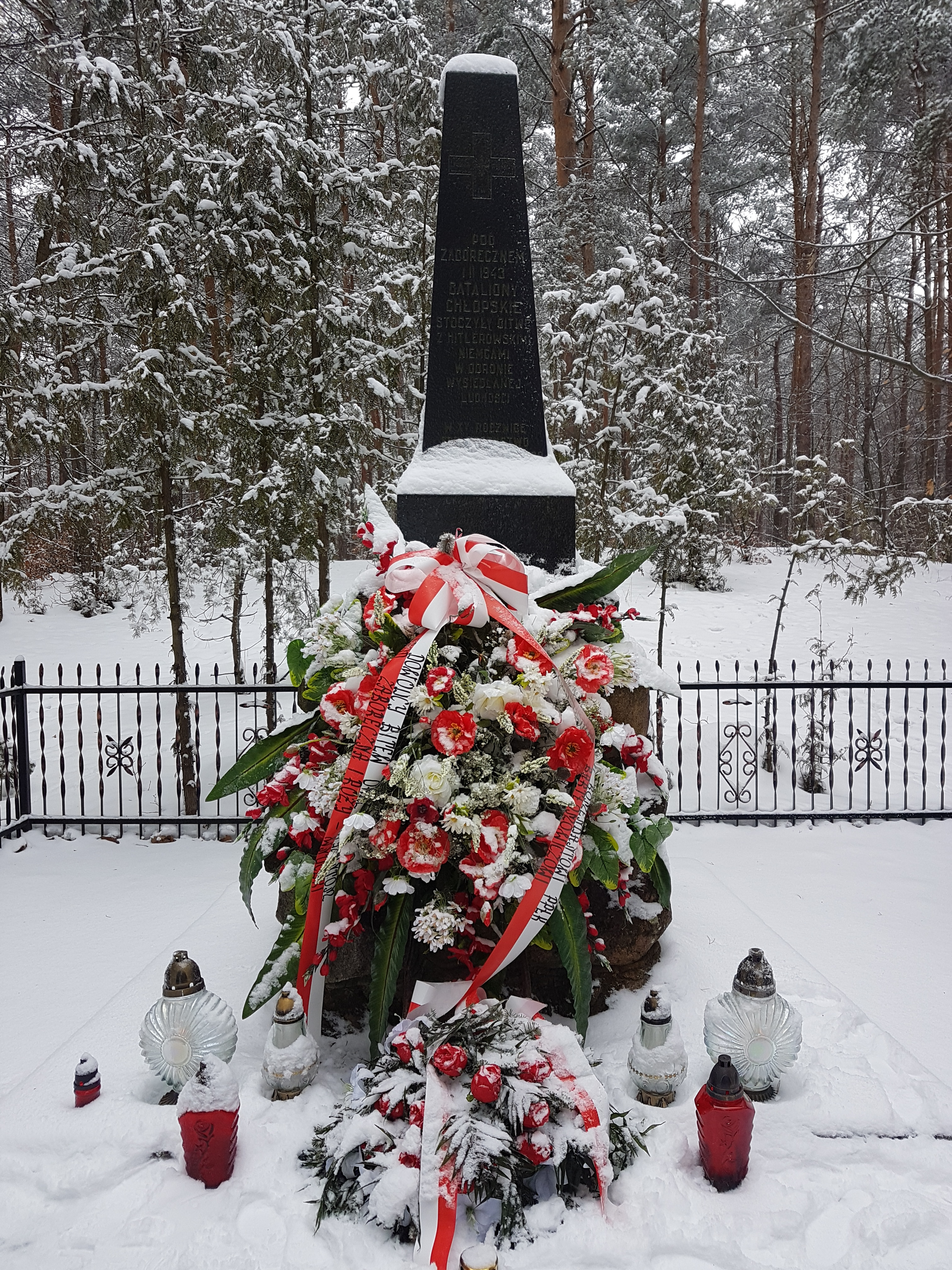 Pomnik Batalionów Chłopskich upamiętniający Bitwę pod Zaborecznym w dniu 1 Lutego 1943r.